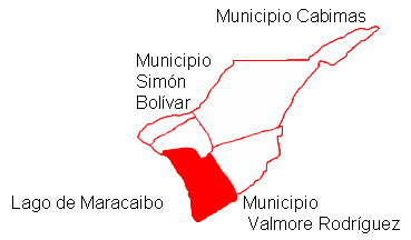 Ubicación de la Parroquia Venezuela, Municipio Lagunillas, Zulia, Venezuela